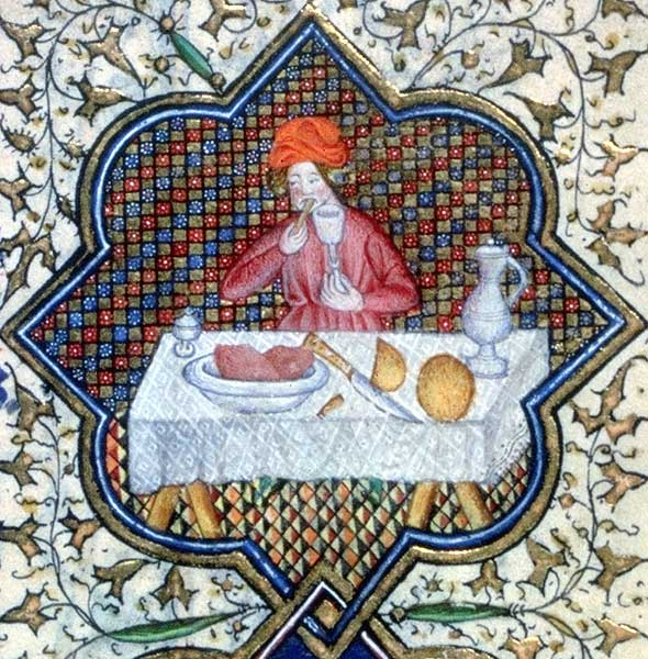 Heures de Marguerite dOrléans